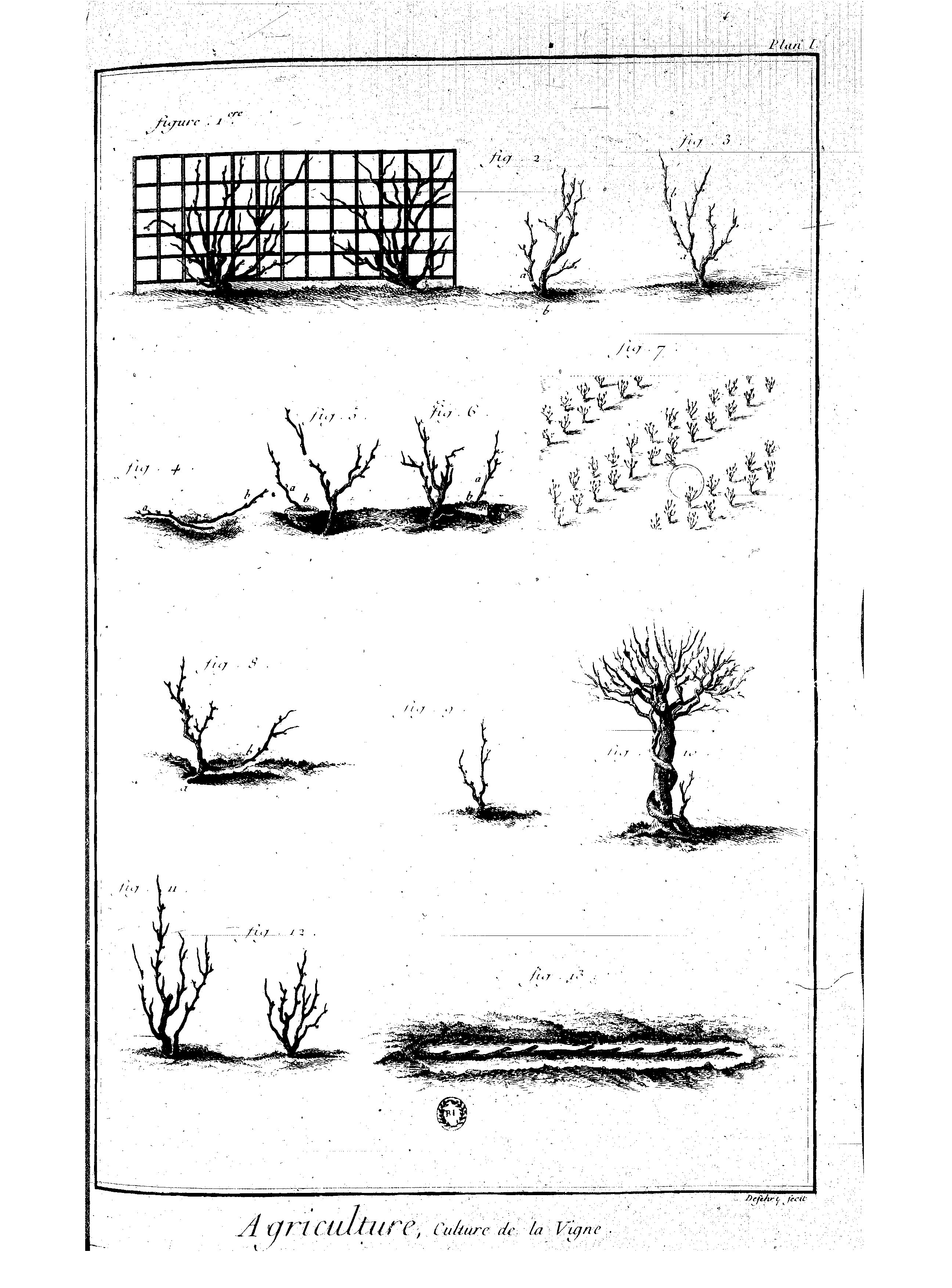 Planches de l'Encyclopédie de Diderot et d'Alembert, volume 1.